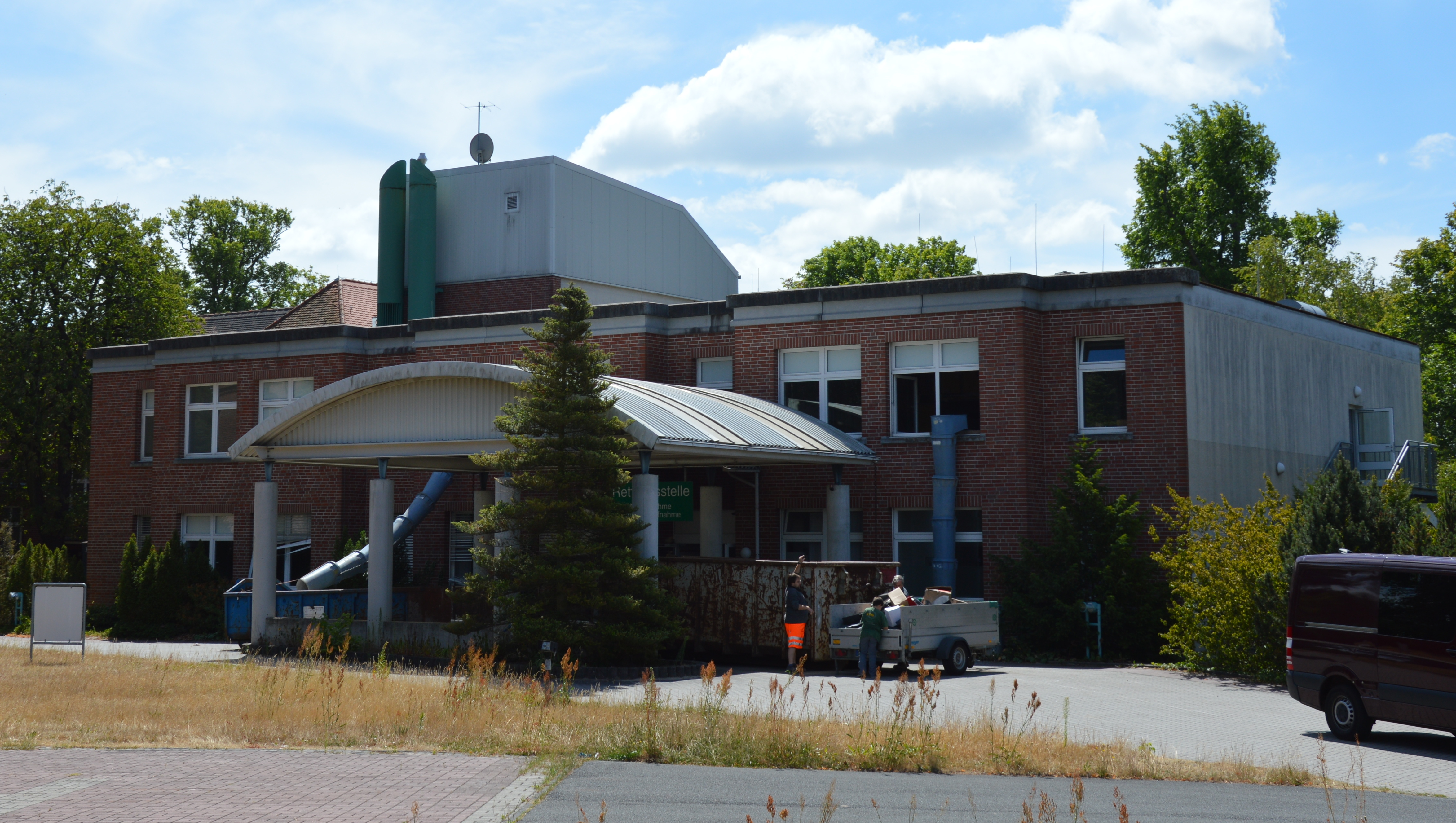 Krankenhaus Genthin 2018, Neubautrakt, hier bei Teilabriss der Innenausstattung nach Schließung